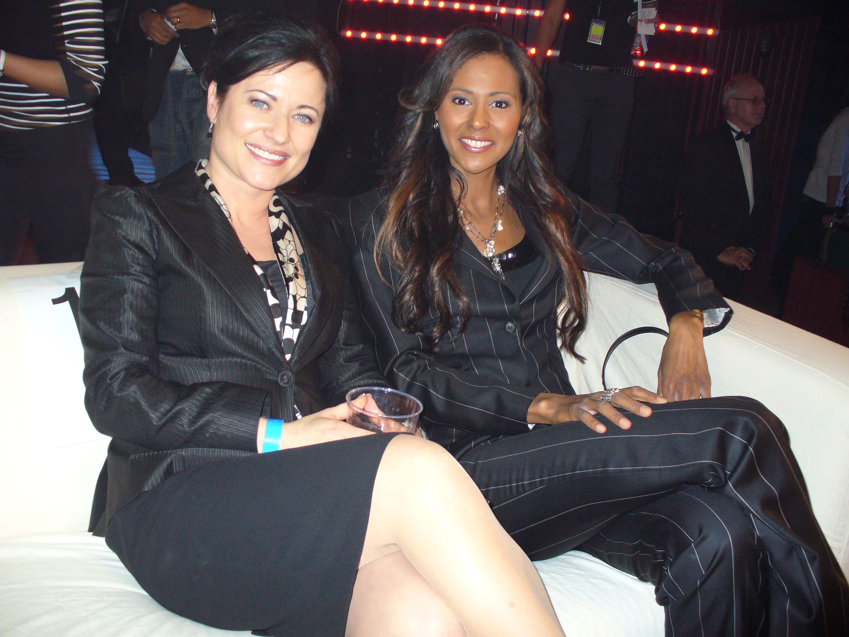 Lisbeth Åkerman and Katarina Sandström at Aftonbladet TV Awards 2007